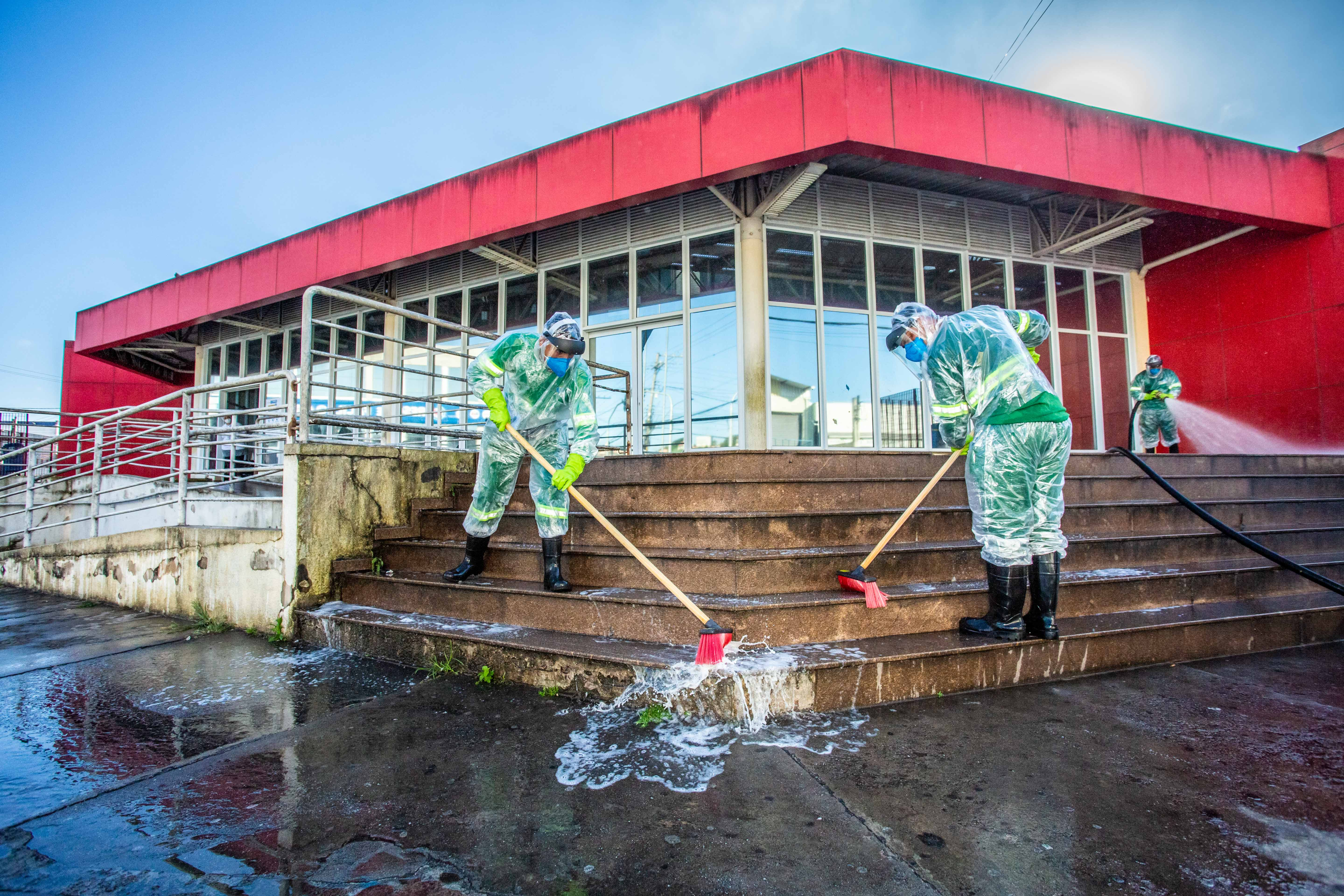 Foto: Willian Leite/PMI